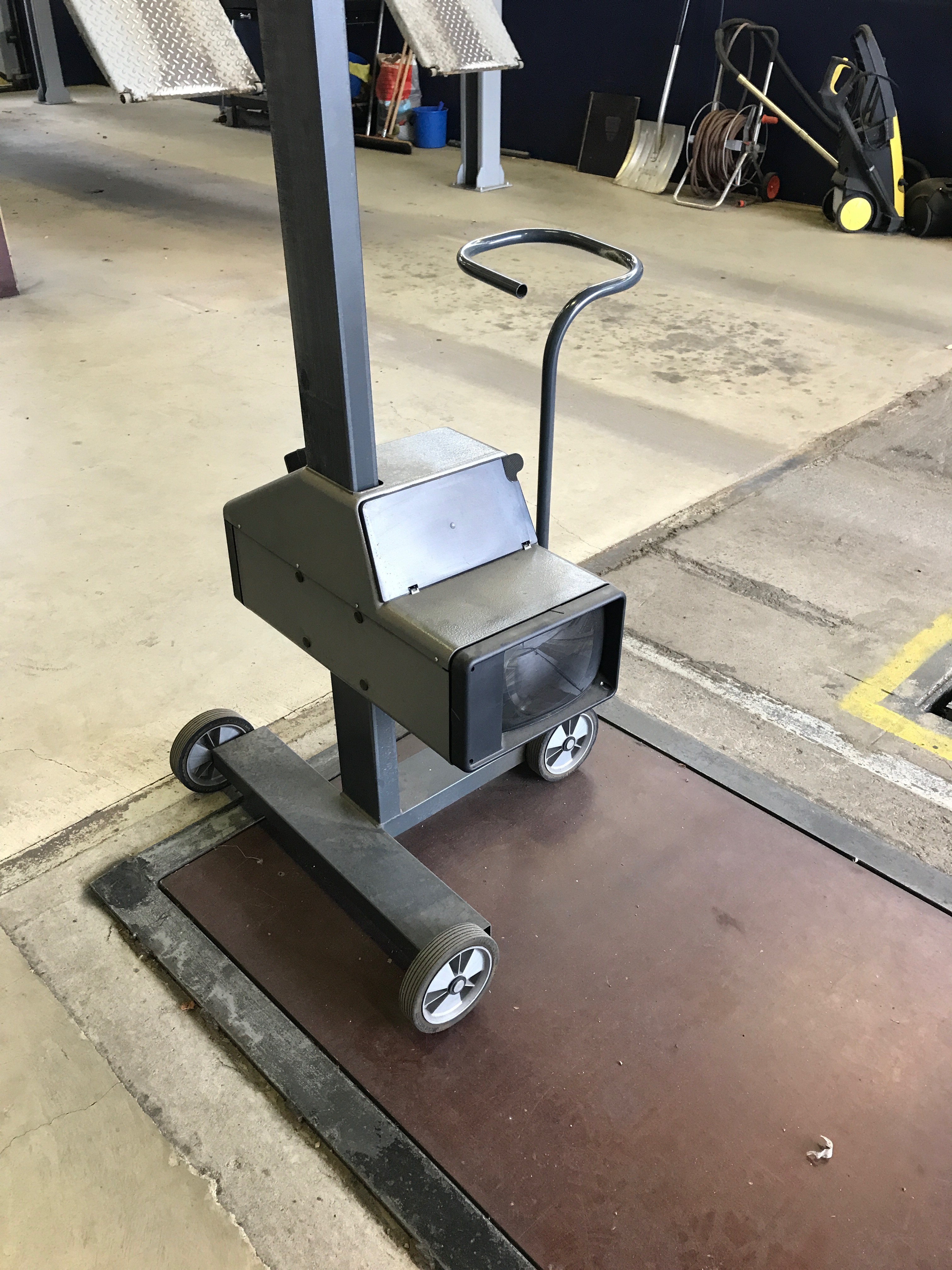 Ajovalojen suuntauslaite katsastusasemalla.